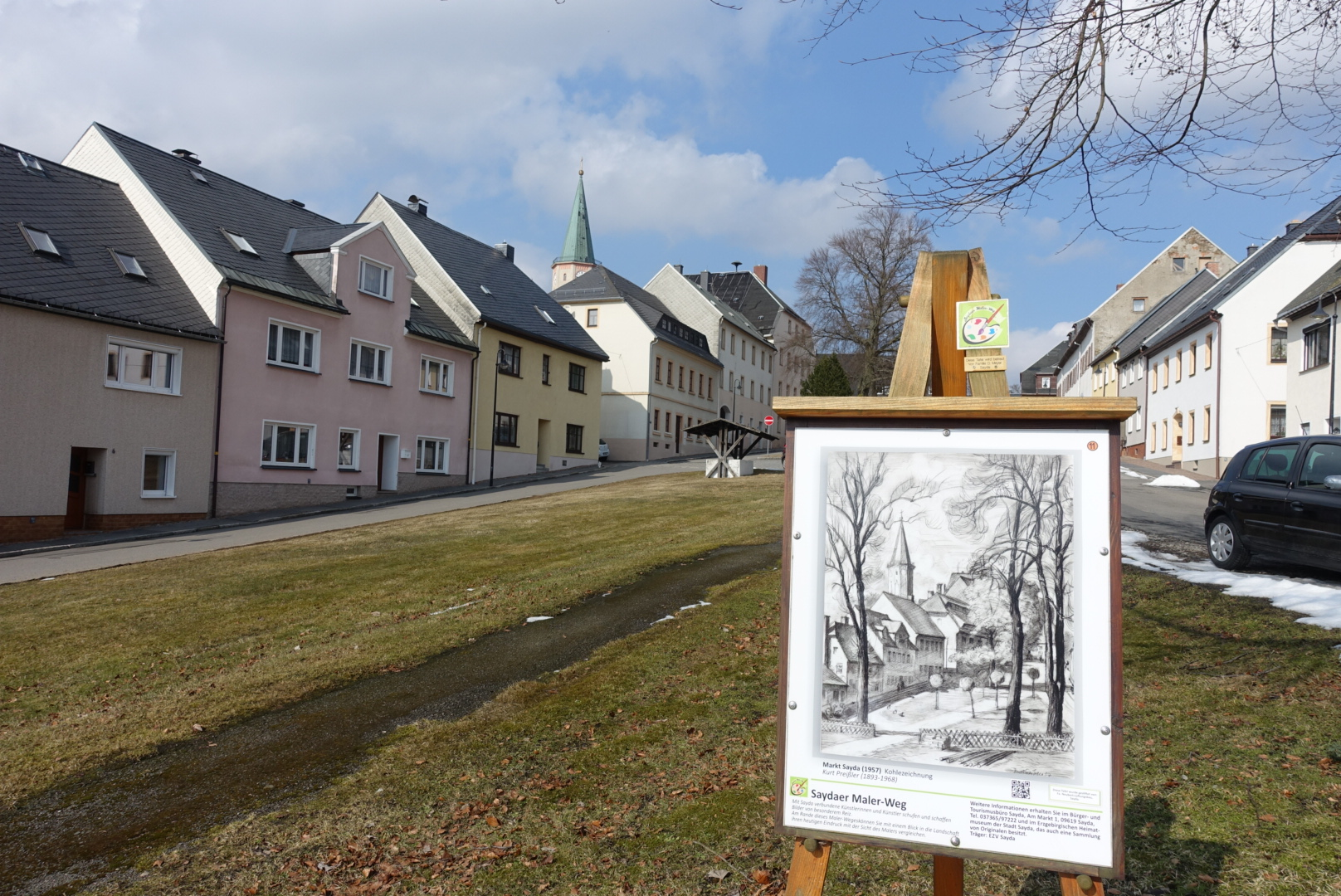 Malerweg Sayda (März 2018)